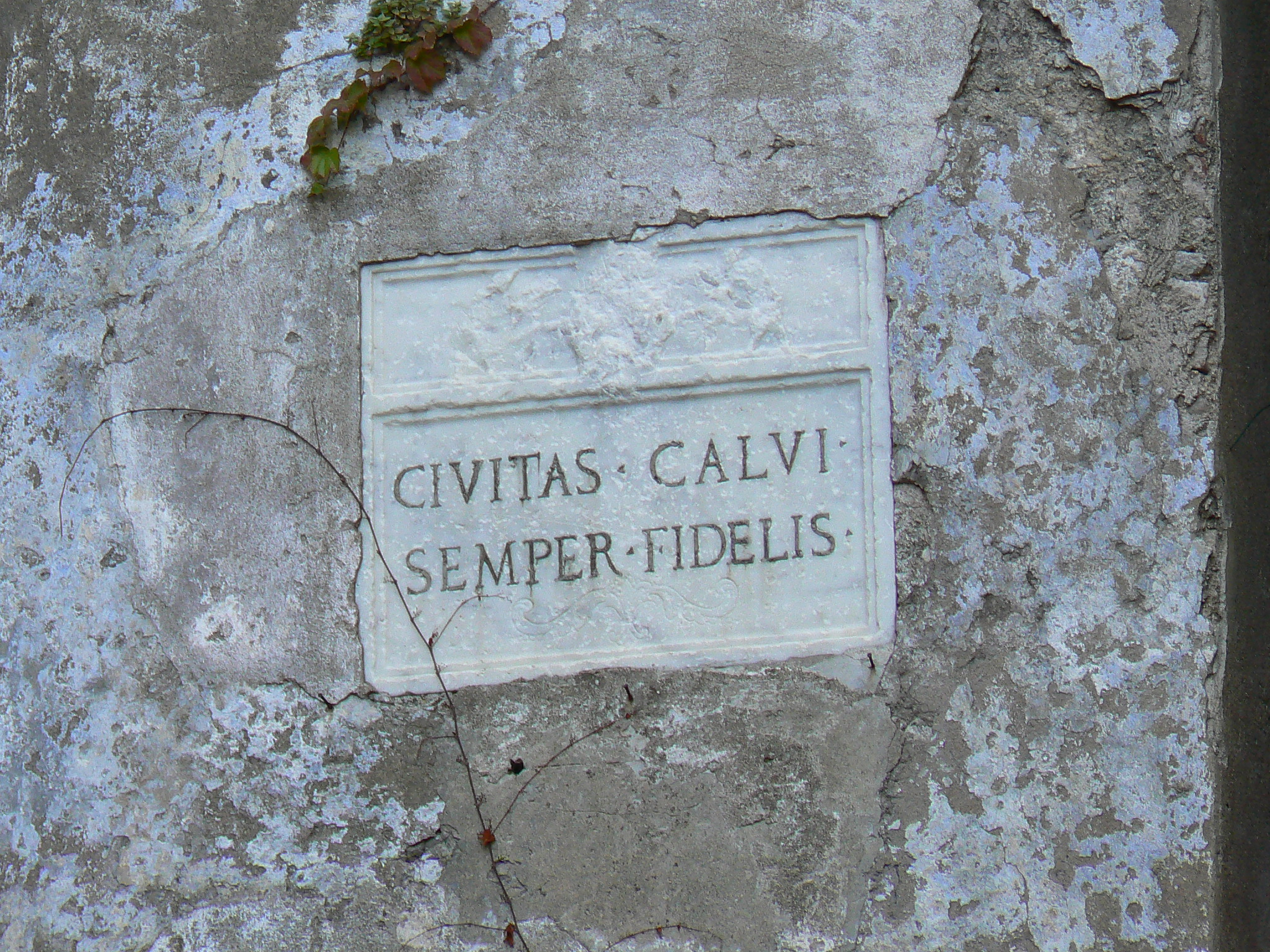 Il motto della città corsa di Calvi posto sopra la porta principale della cittadella